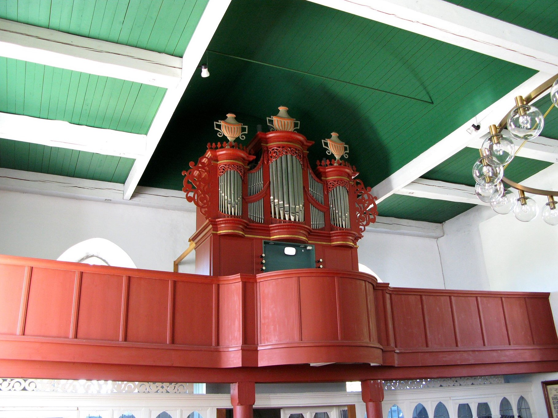 Orgel in Wiegboldsbur, Landkreis Aurich